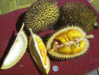 Durio kutejensis fruit, Muara Lawa, Kutai Barat, East Kalimantan, Indonesia